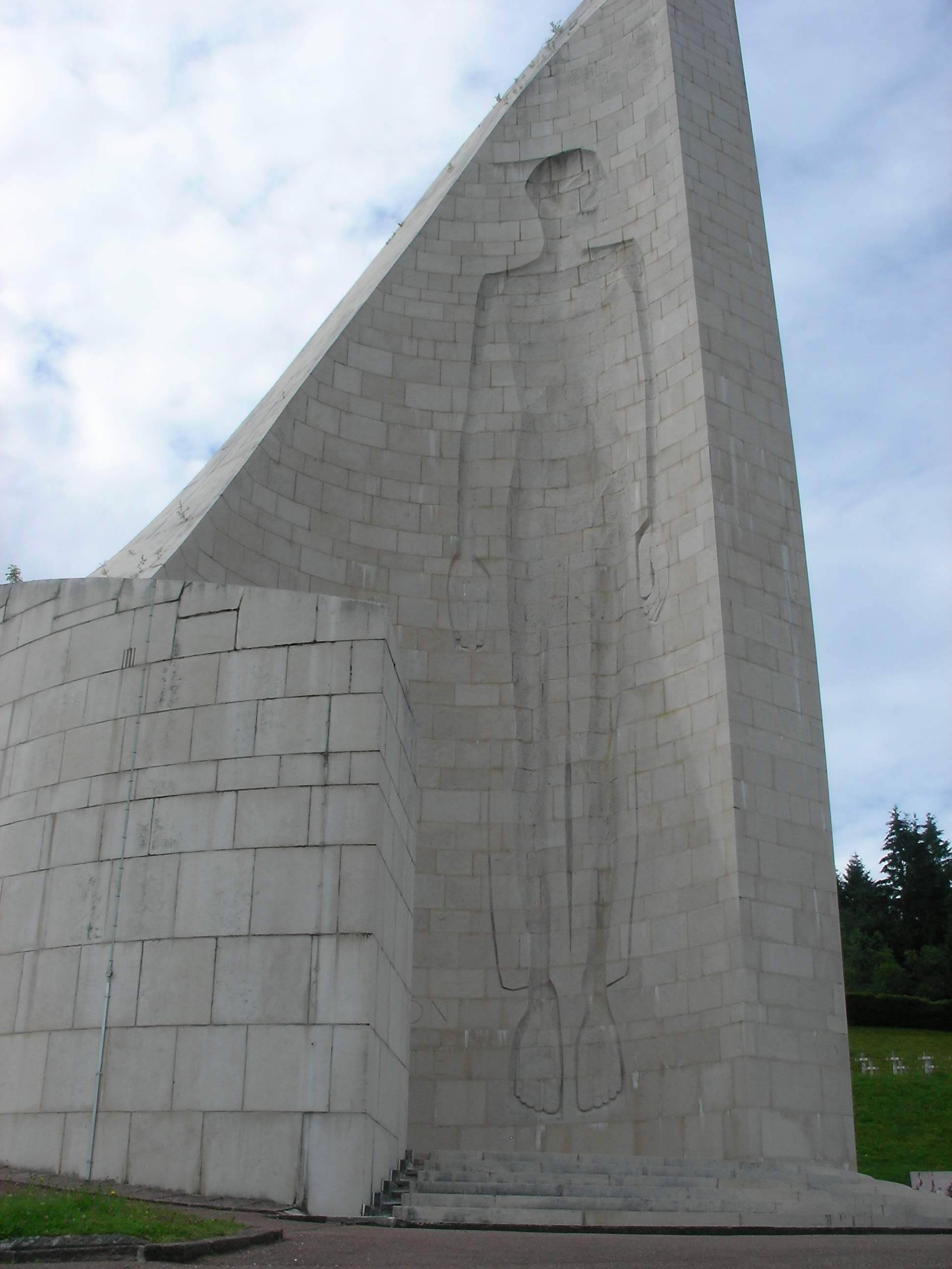 Mémorial aux martyrs et héros de la déportation au camp de Natzweiler-Struthof à Natzwiller (Bas-Rhin, France).